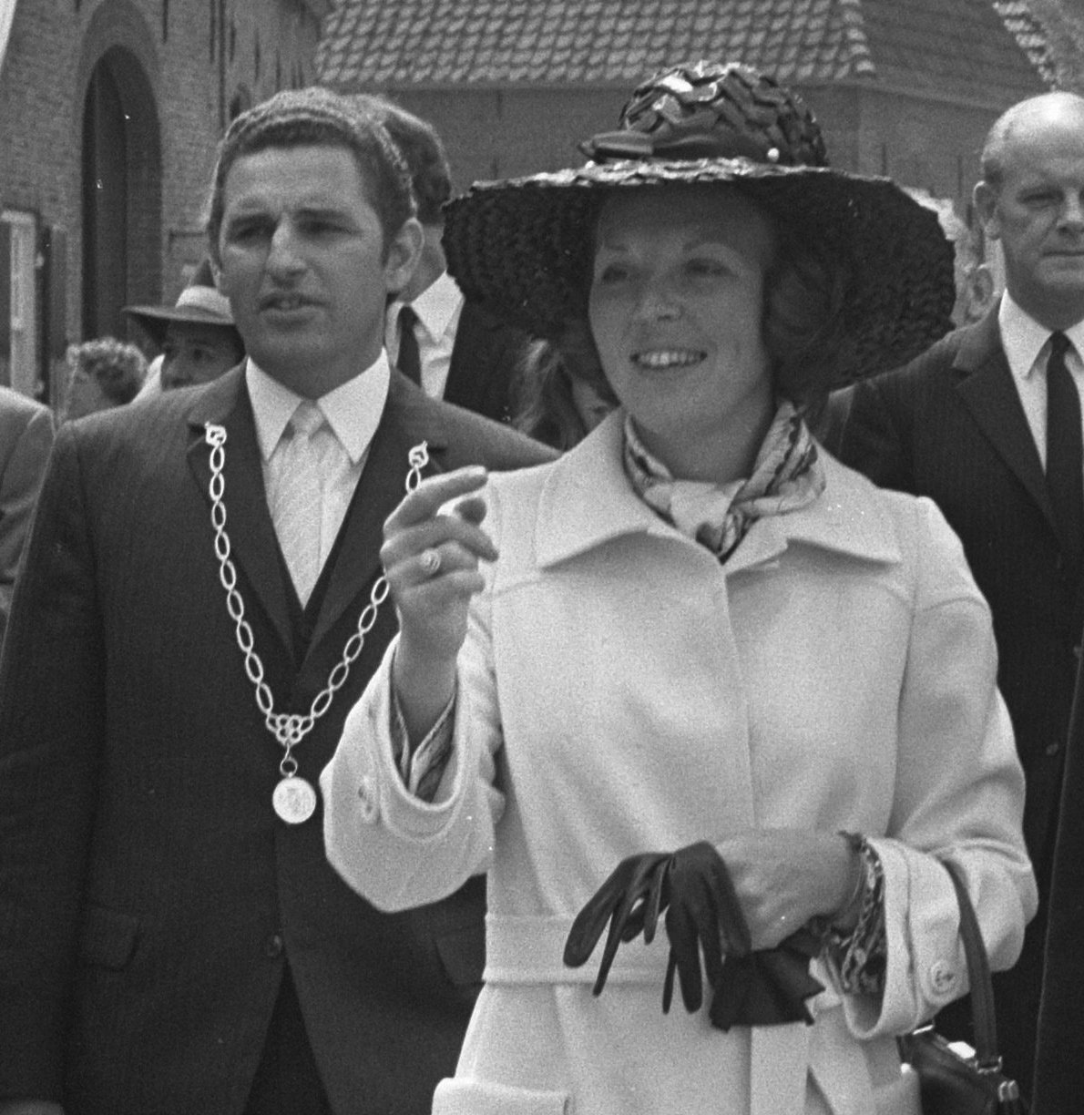 Eerste dag: wandeling met burgemeester en notabelen door de straten van het stadje Bronkhorst